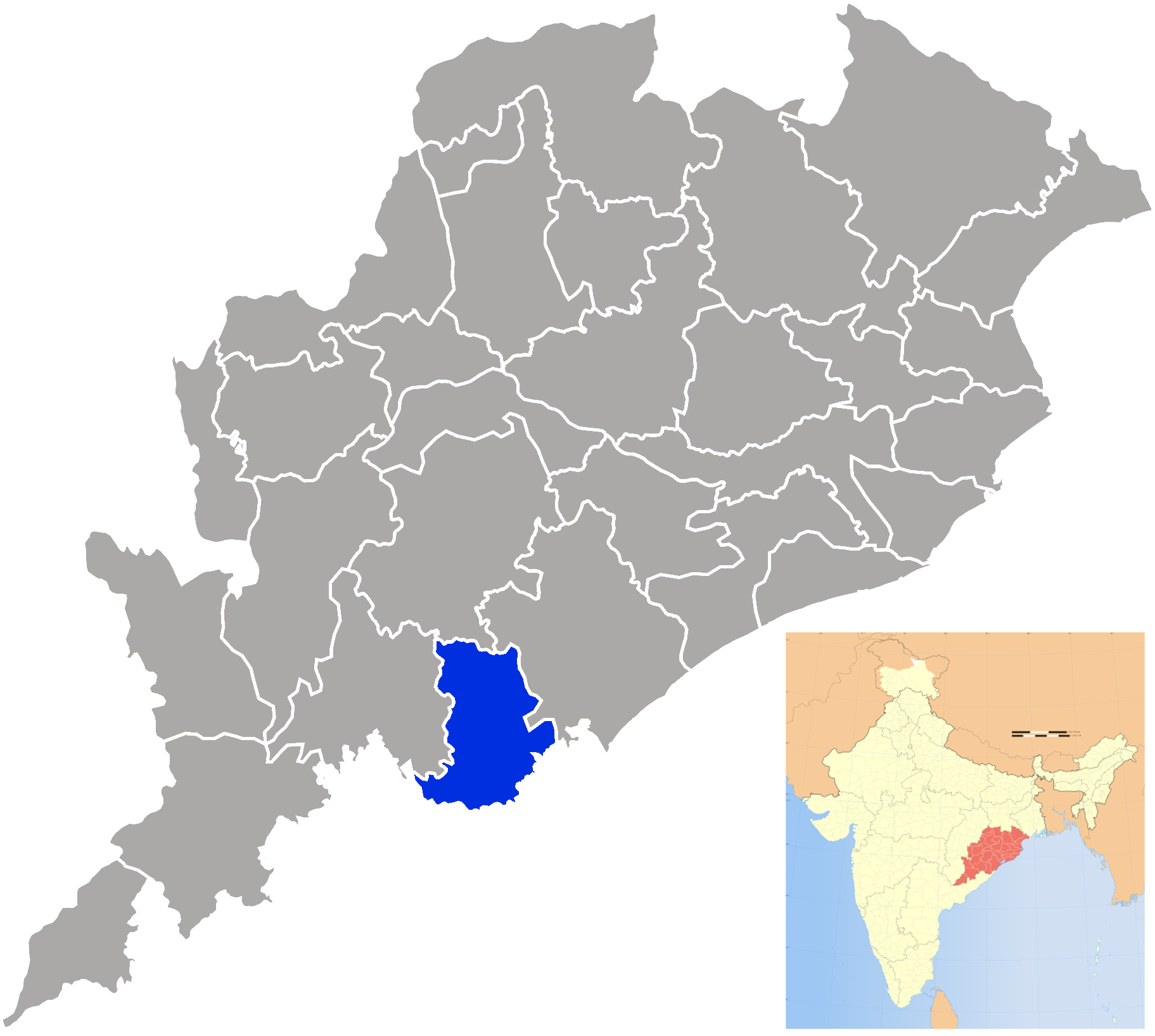 Gajapati district in Orissa